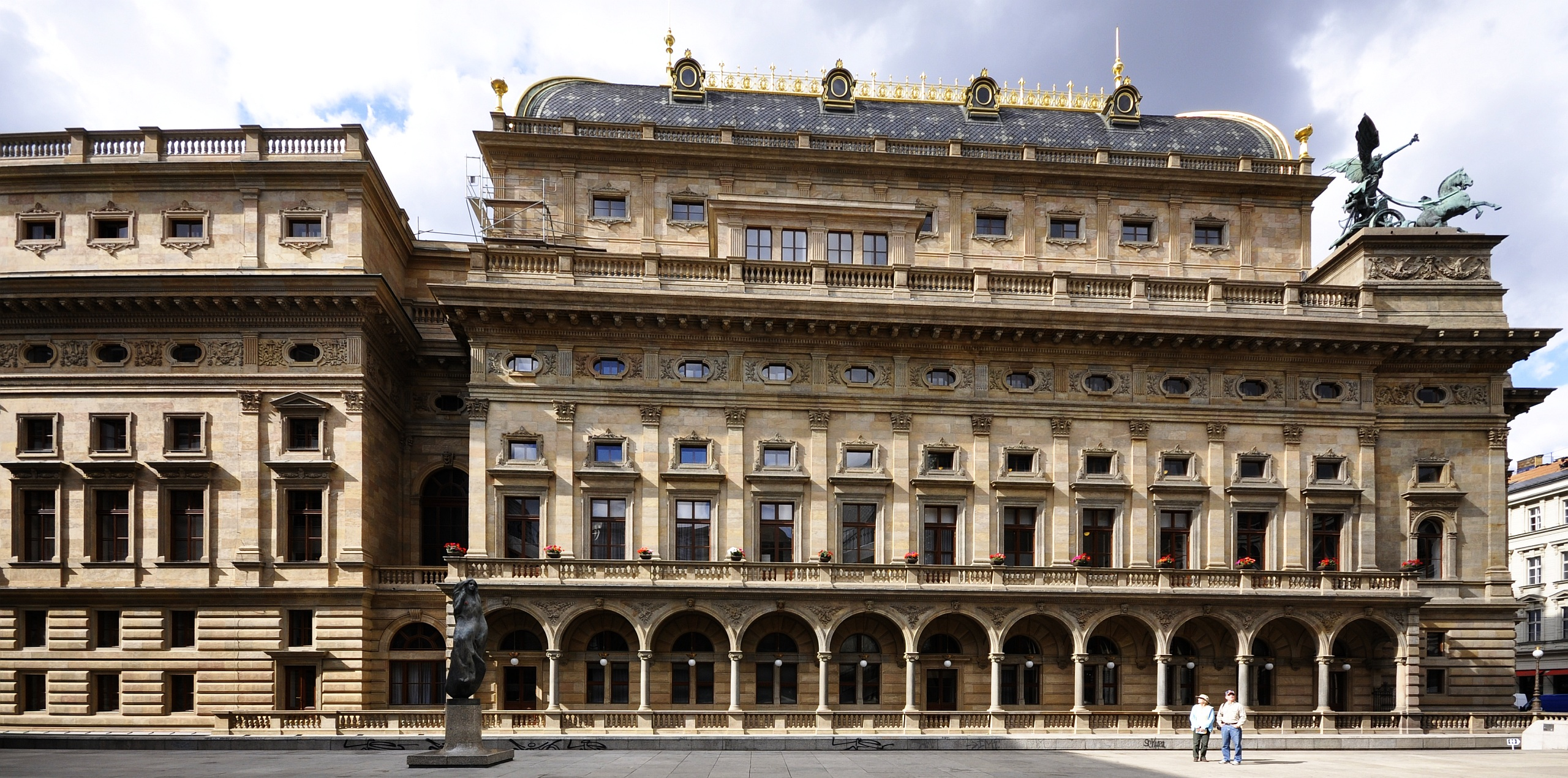 Národní divadlo, Praha 1-Nové Město, Národní 223/2, Masarykovo nábřeží 223/40 a 42, Divadelní 223/1, Nové Město (Praha).